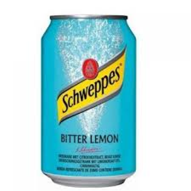 Bitter Lemon